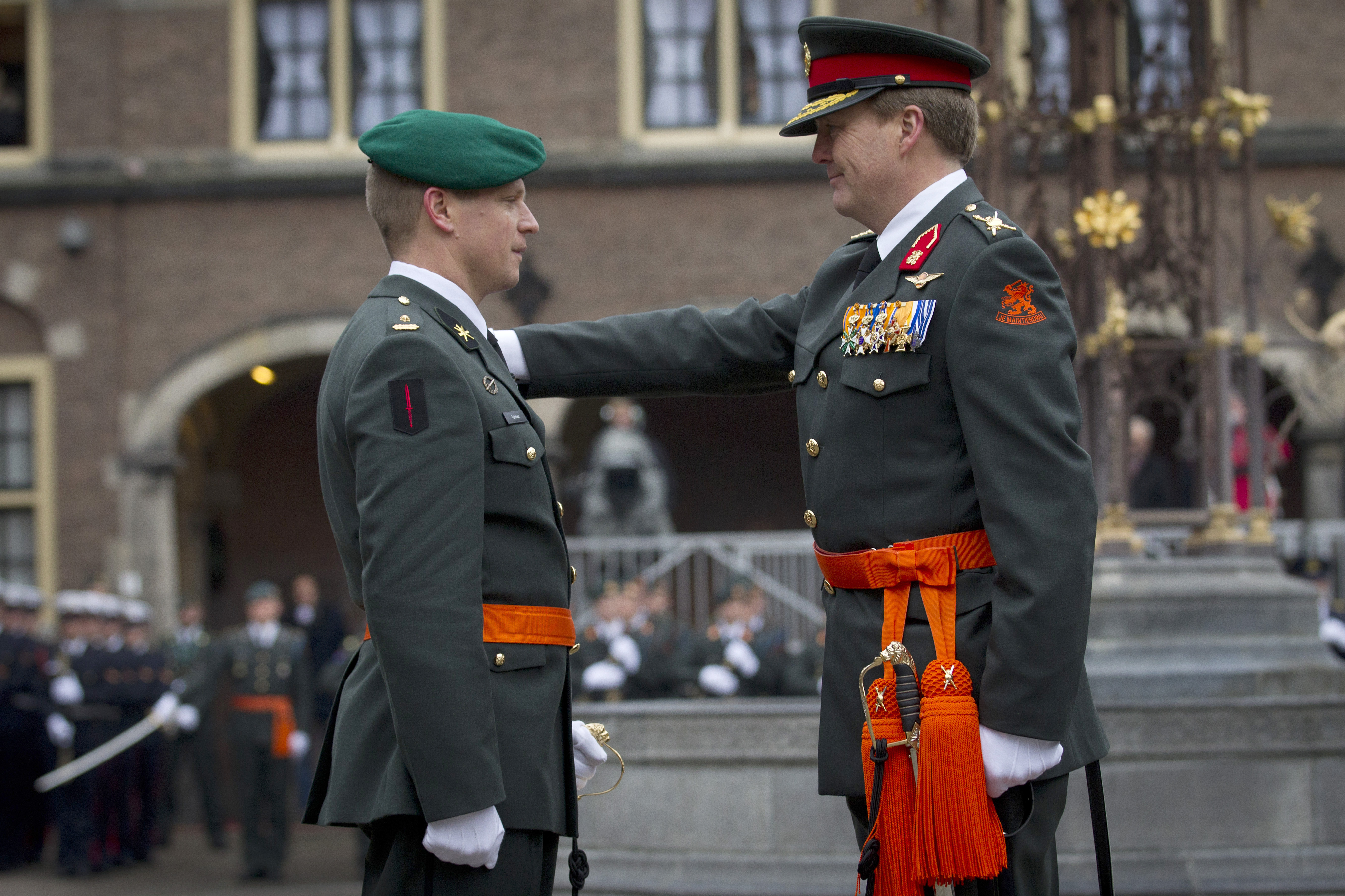 Majoor Gijs Tuinman ontvangt de ridderslag van koning Willem Alexander.